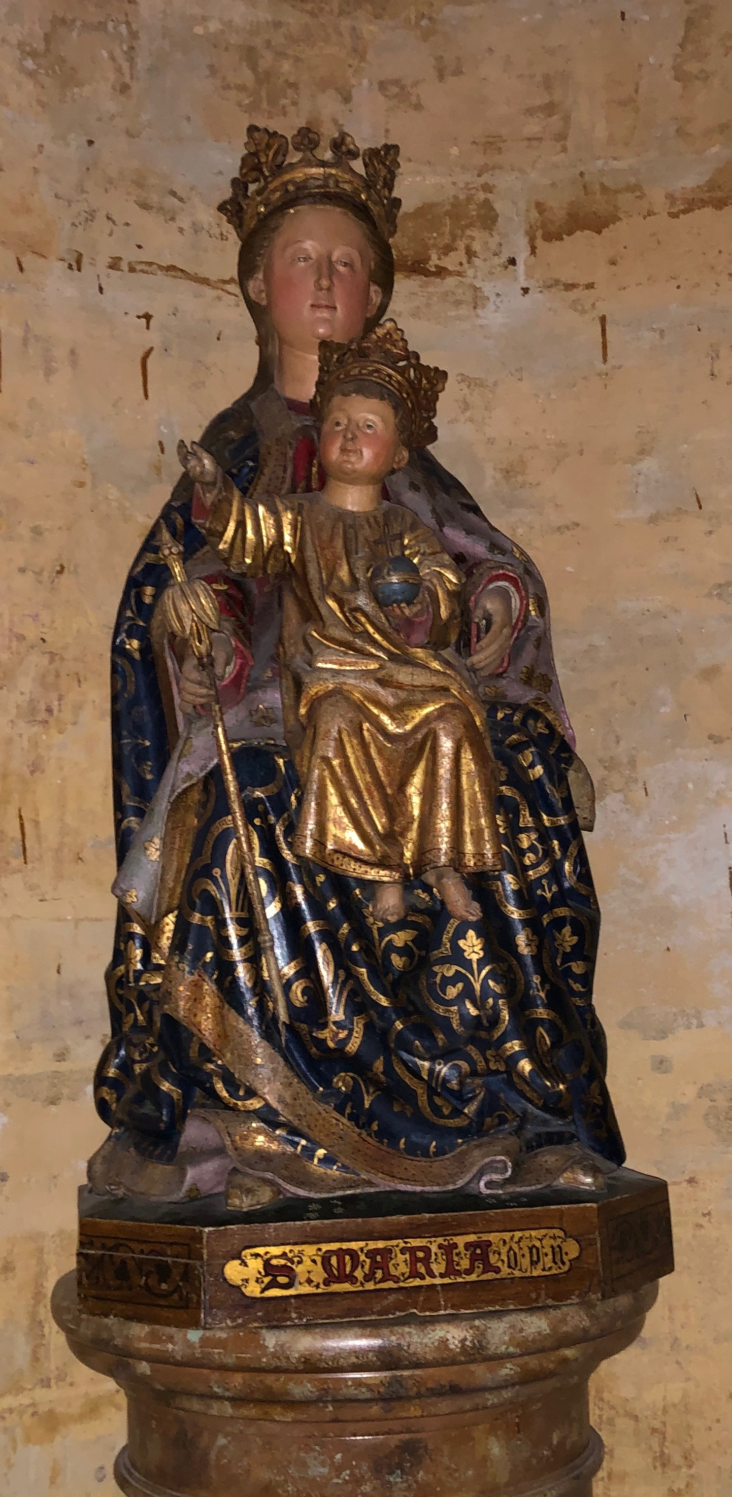 Onze Lieve Vrouw Vogelsangh, Munsterkerk Roermond